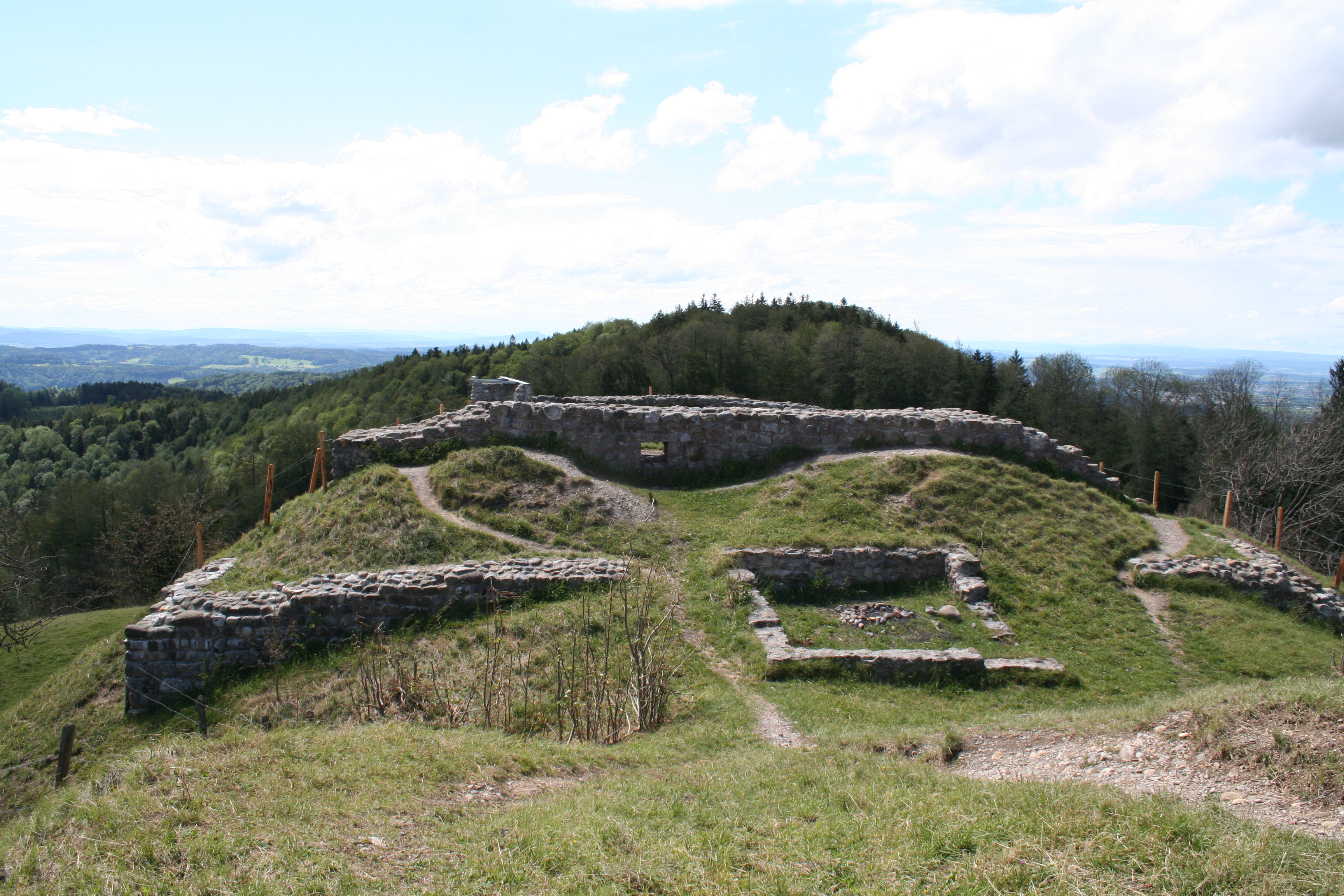 Ruine Schauenberg, Blick nach Westen